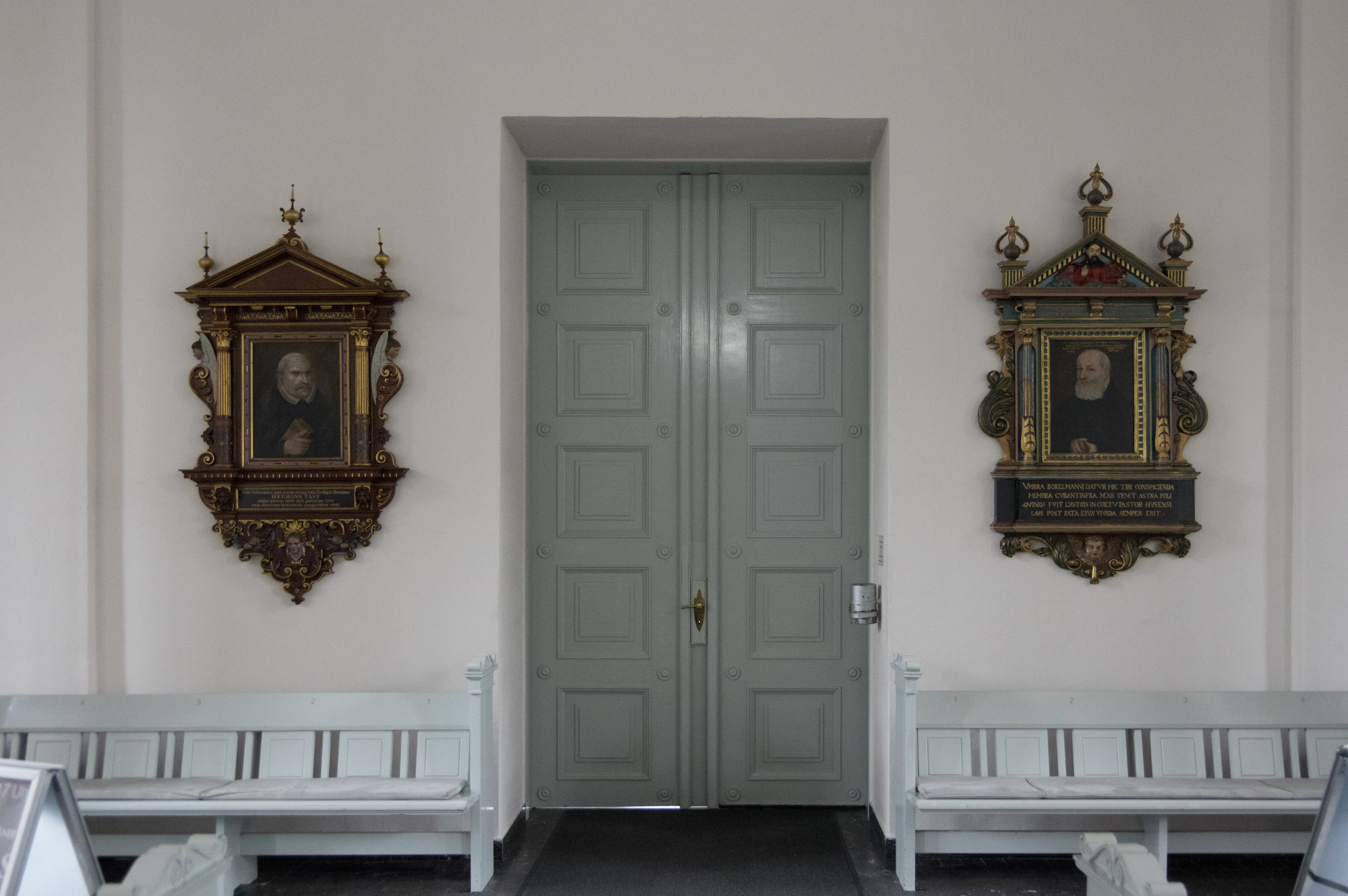 Husum in Schleswig-Holstein. Die Kirche steht unter Denkmalschutz.